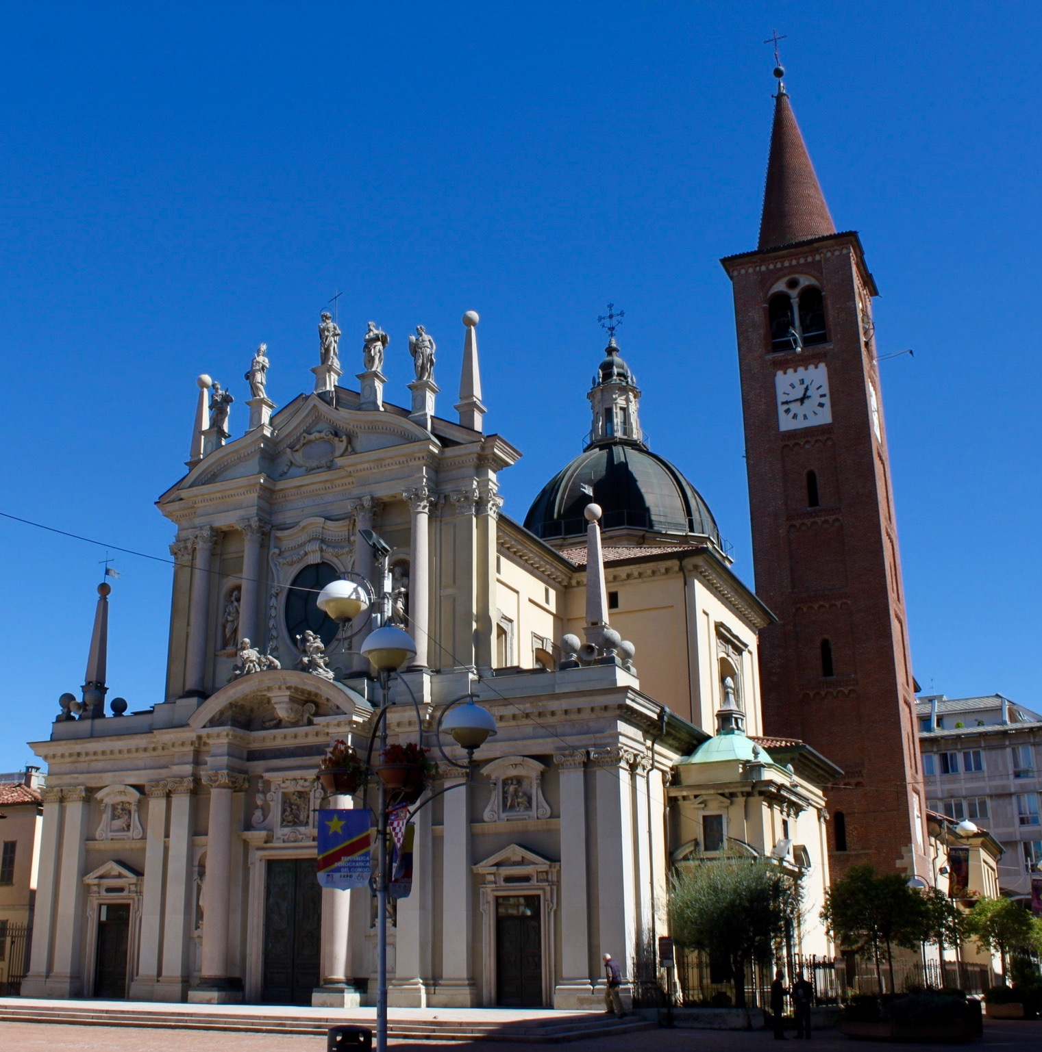 Basilica di San Giovanni Battista This is a photo of a monument which is part of cultural heritage of Italy.